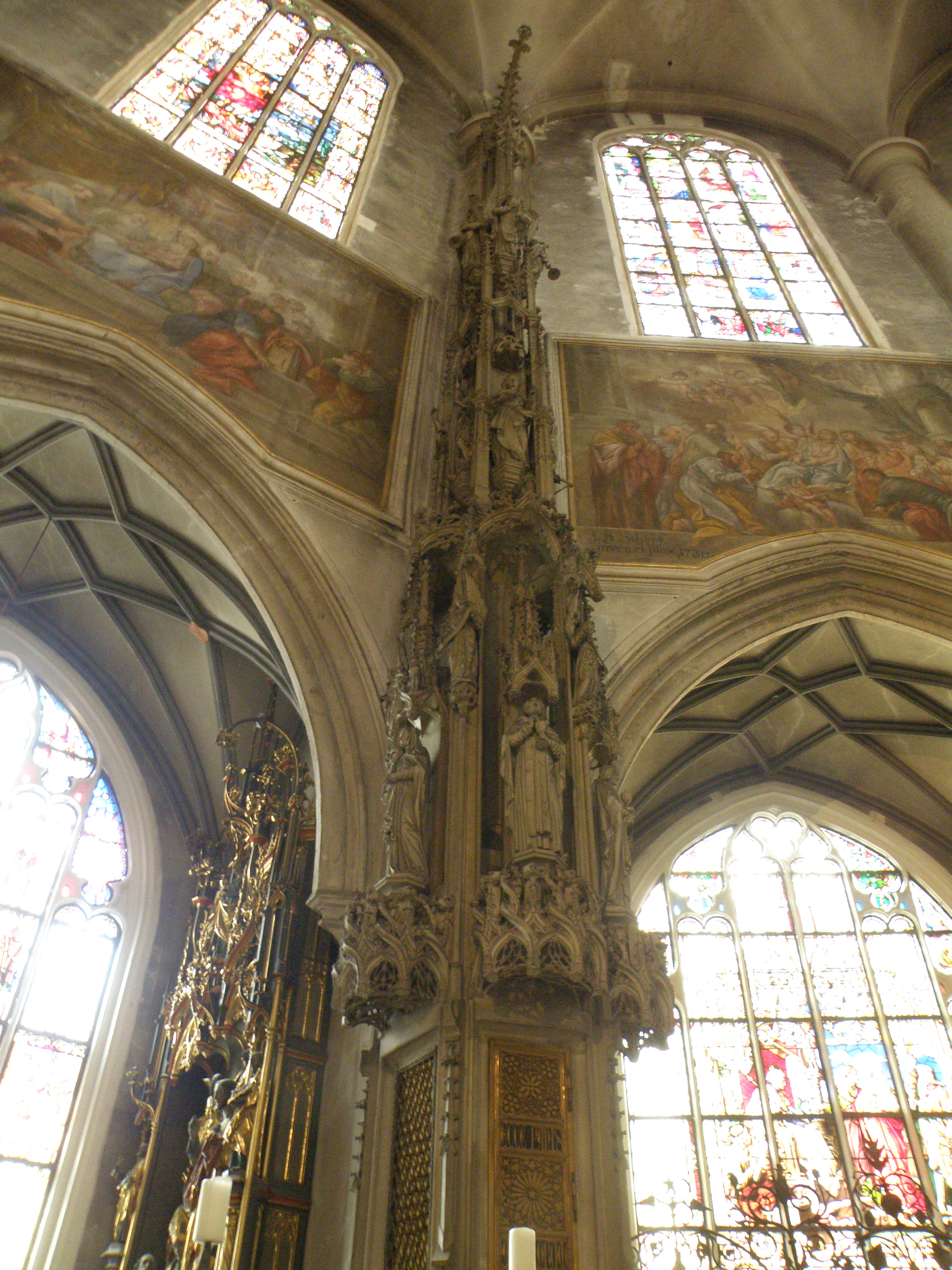 Kirche St. Jacob & St. Tiburtius, Straubing